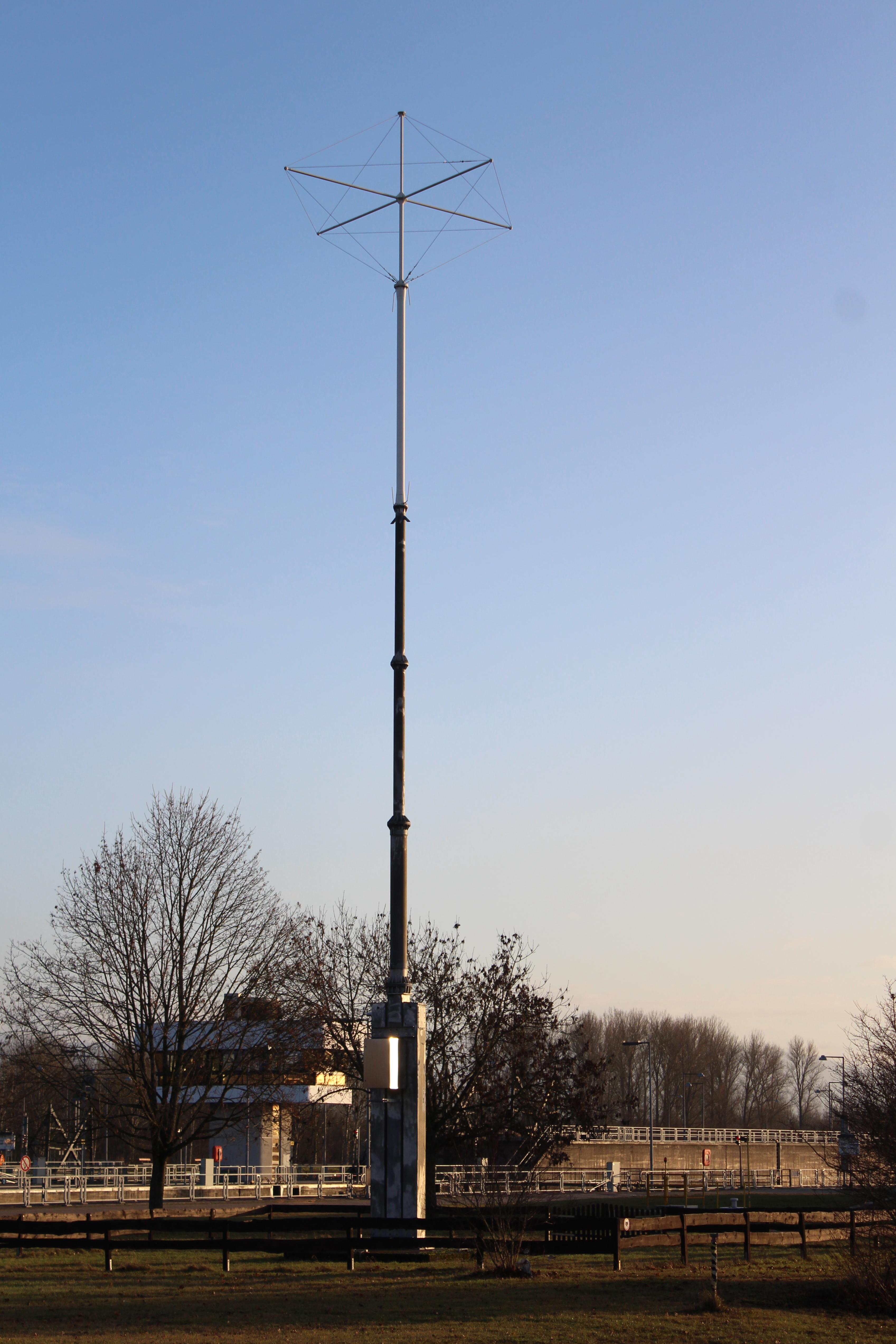 DGPS-Sendeturm Iffezheim